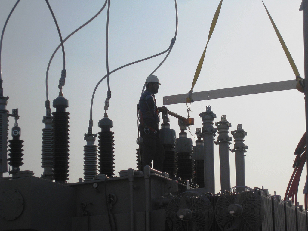 A Electricity System